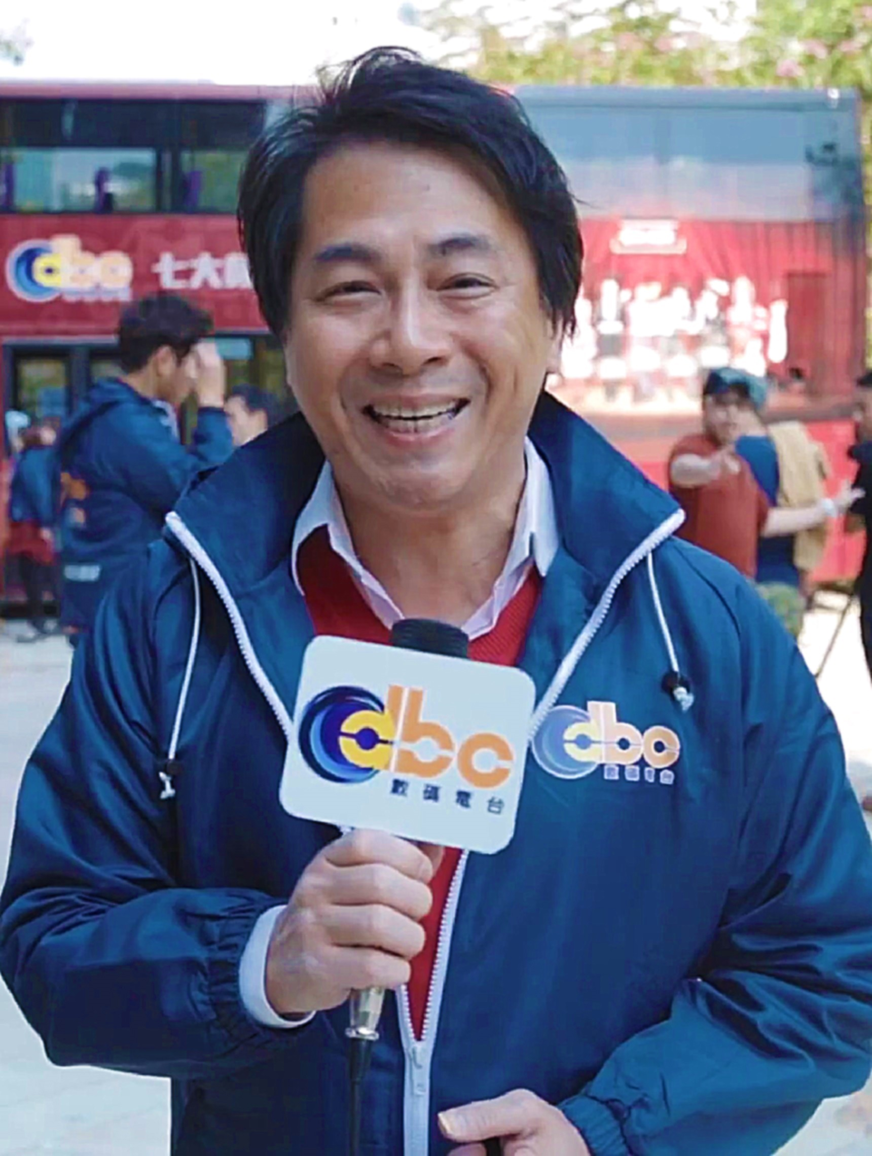 前香港亞洲電視新聞主播，有「新聞王子」的稱號